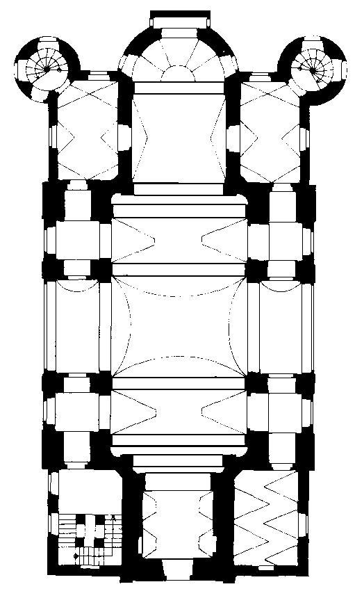 Grundriss der Pfarrkirche Großweikersdrof